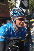 Italian road racing cyclist Paolo Savoldelli.